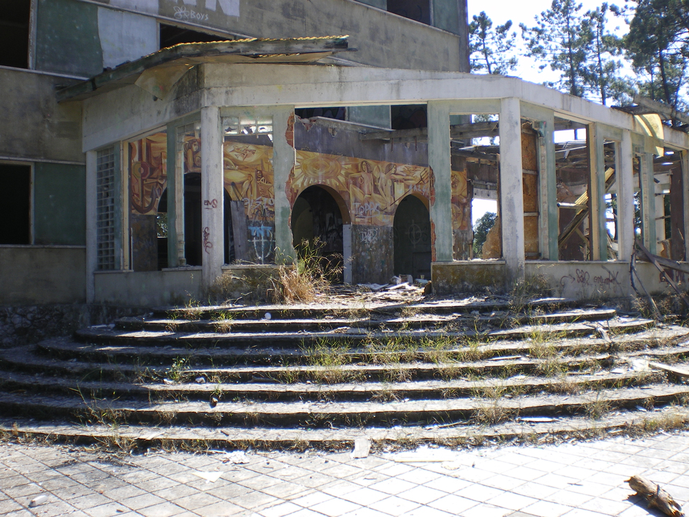 Hotel que servia o complexo turístico do Muxito